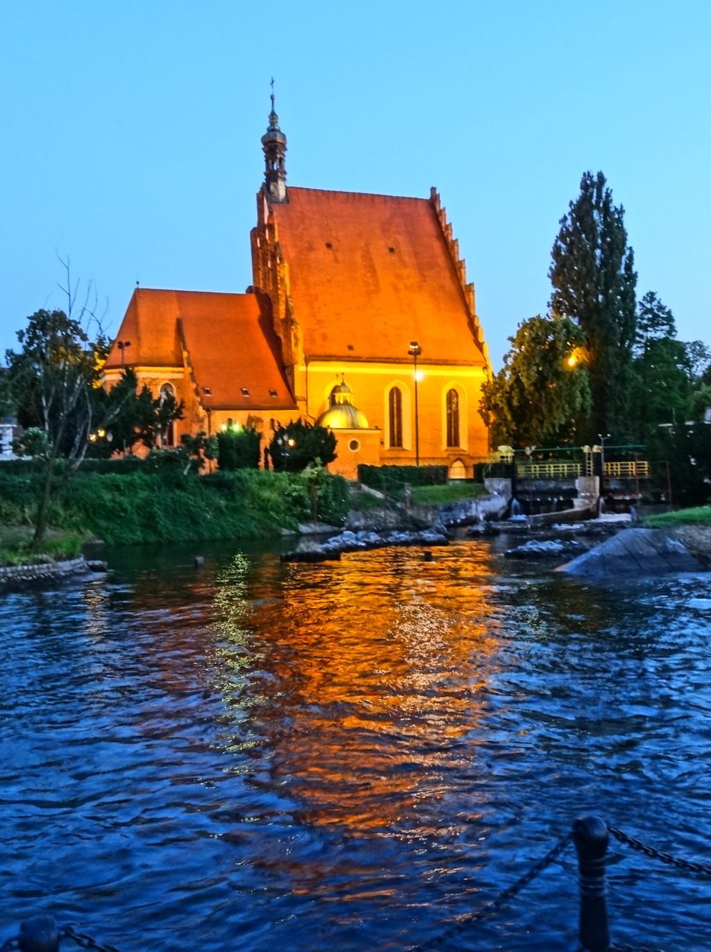 Katedra p.w. św. Marcina i Mikołaja w Bydgoszczy (XIV-XV wiek)